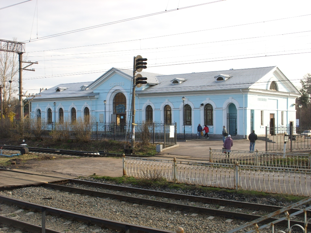 Вокзал на ст. Сосново